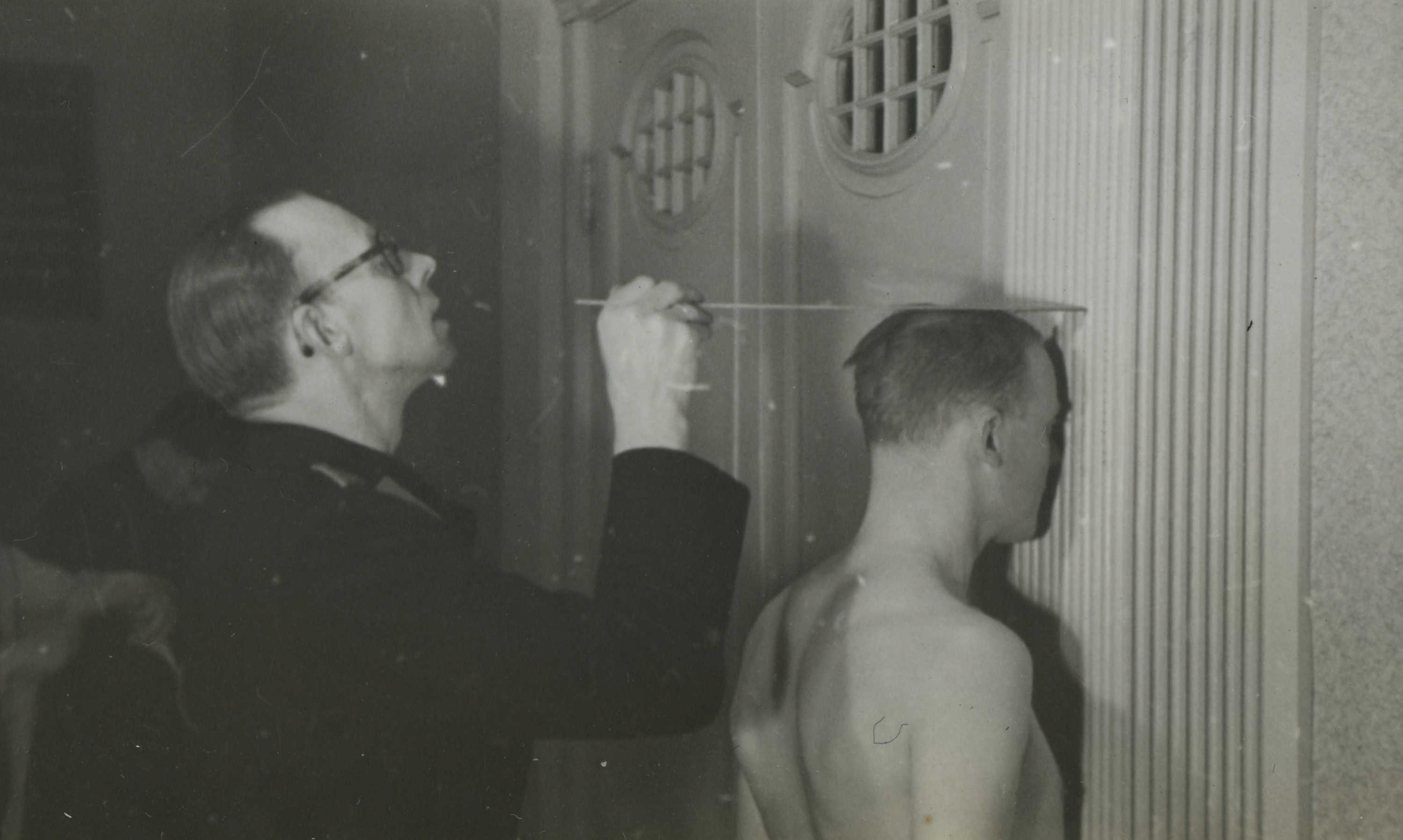 Keuring Landwacht te Amsterdam op 28-2-1944. Deze foto is afkomstig uit het archief van de Fotodienst der NSB.